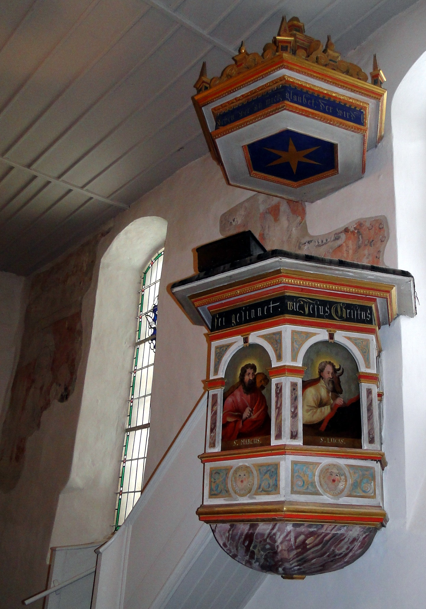 Christophoruskirche Dresden-Wilschdorf